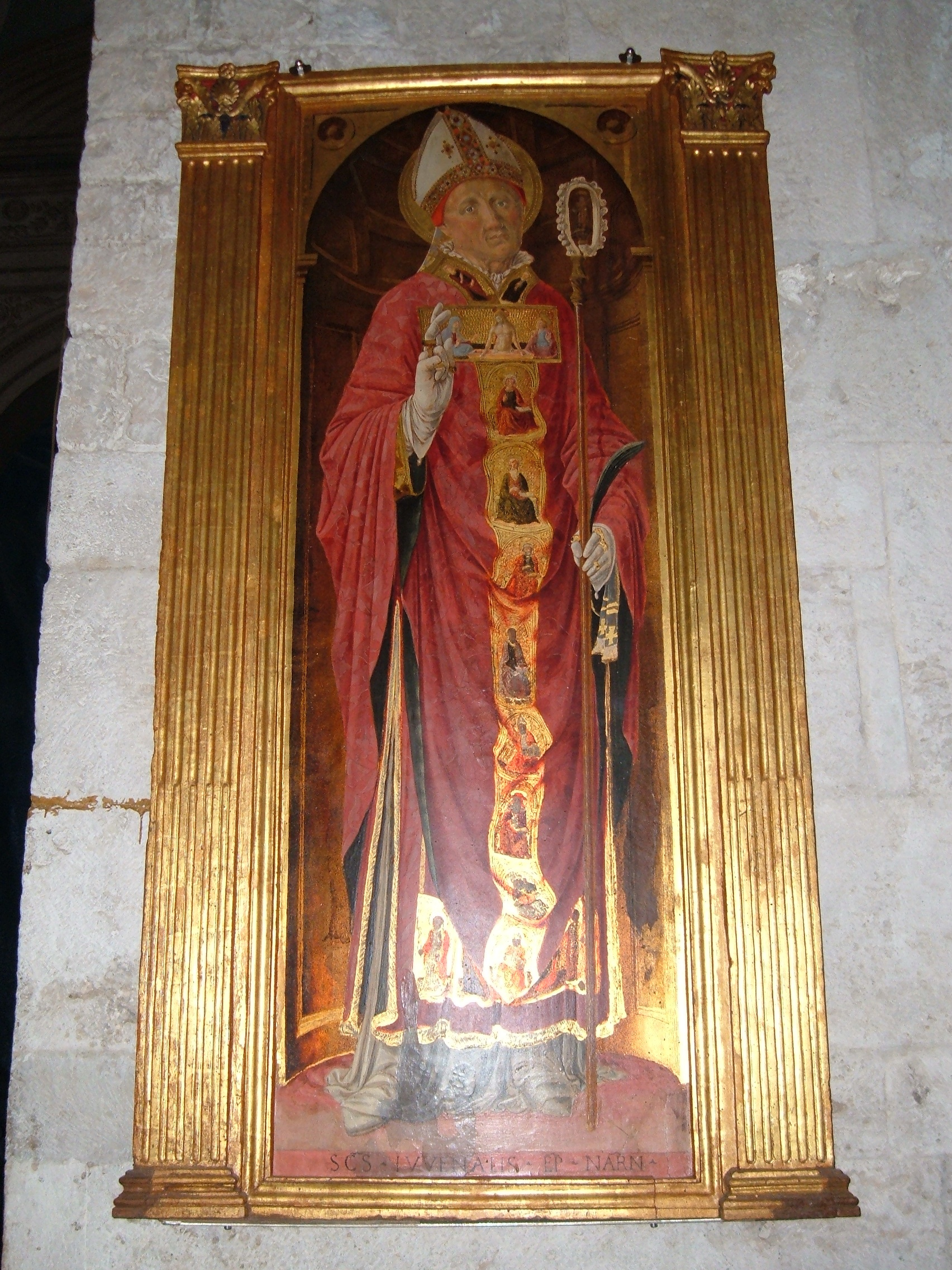 Chiesa di San Giovenale, a Narni. Interno: tavola raffigurante san Giovenale.